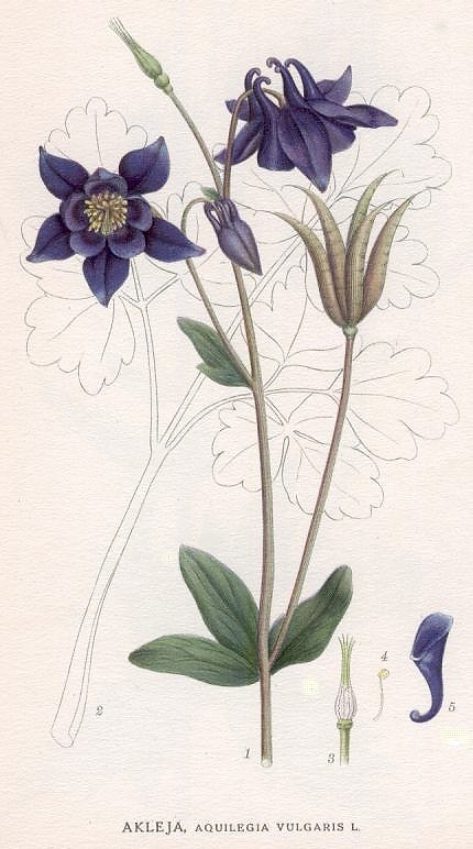 Original Description Akleja, Aquilegia vulgaris L.